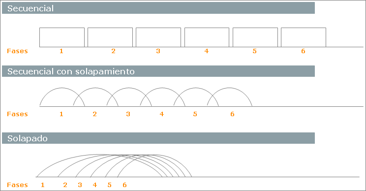 Esquema de los patrones de los ciclos de desarrollo de nuevos productos, según expusieron Hirotaka Takeuchi e Ikujiro Nonaka, en su artículo The New New Product Development Game.